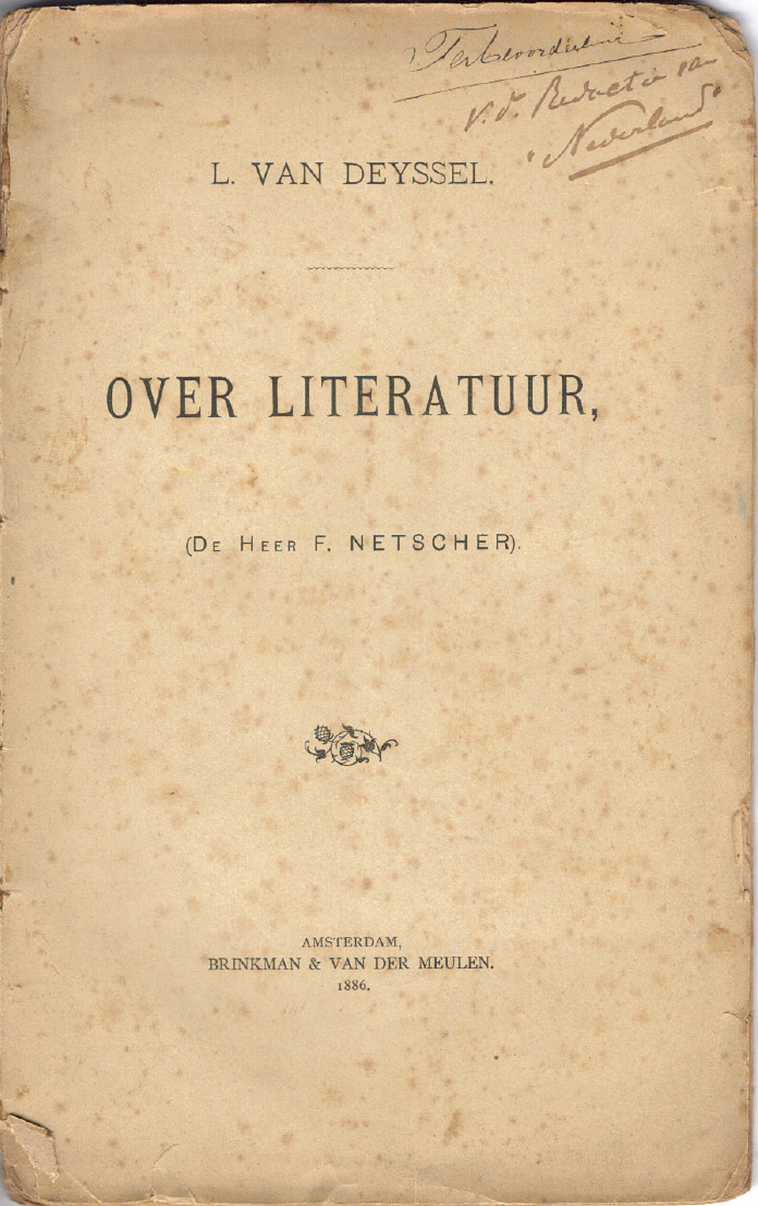 Omslag van Over literatuur, (De Heer F. NETSCHER).